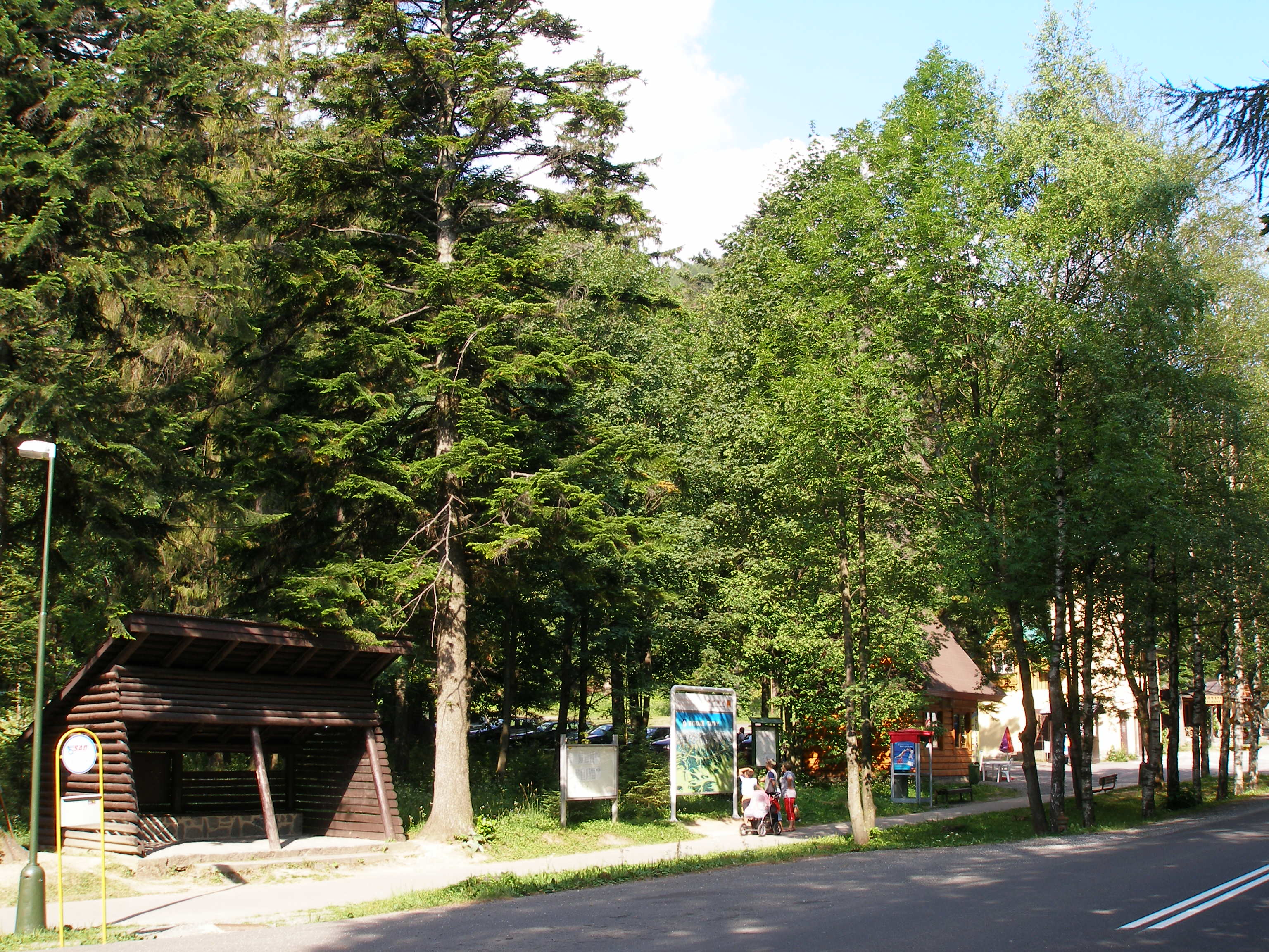 Osada Tatranská Kotlina, Slovakia